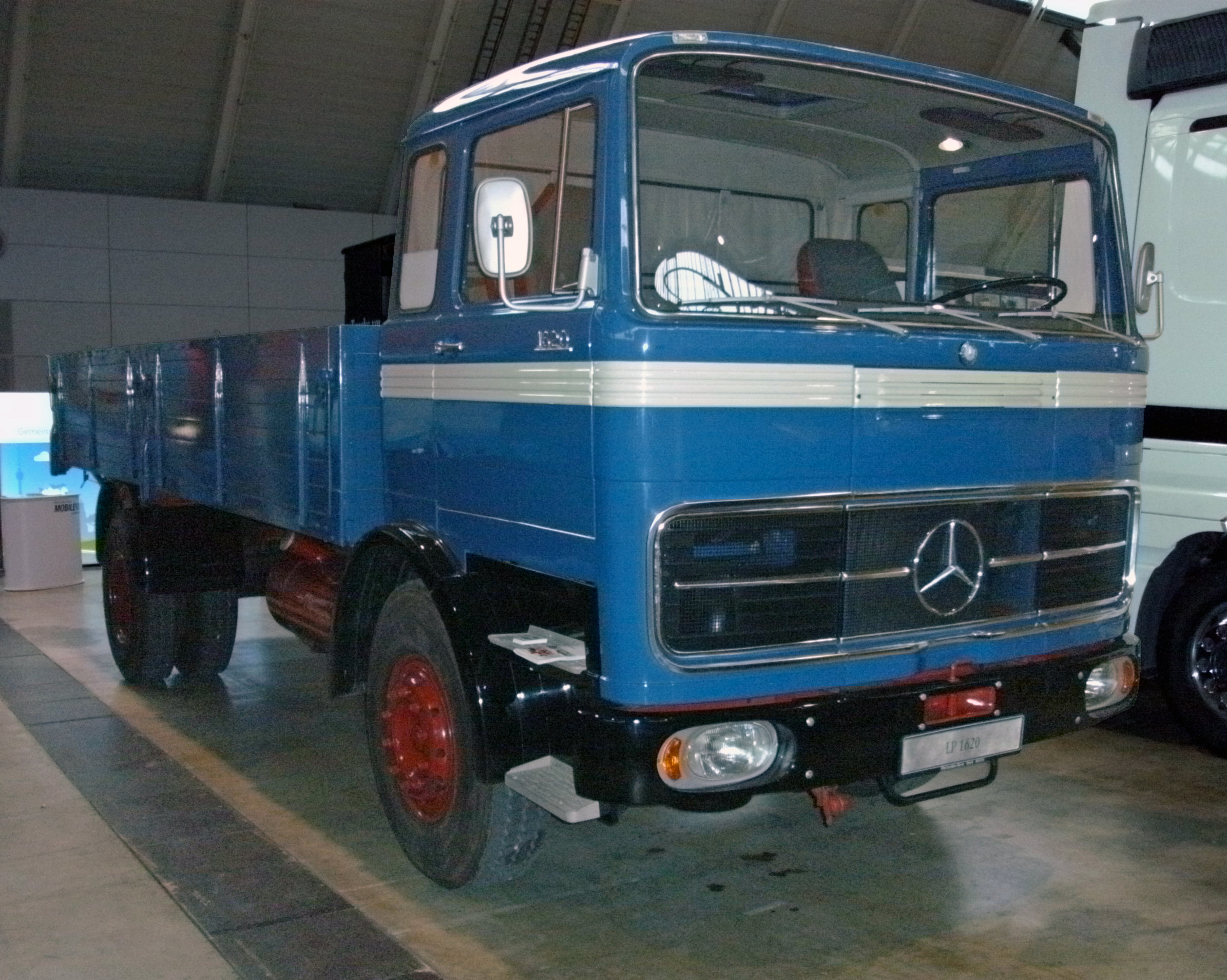 Mercedes-Benz LP1620, Baujahr 1964, 202 PS